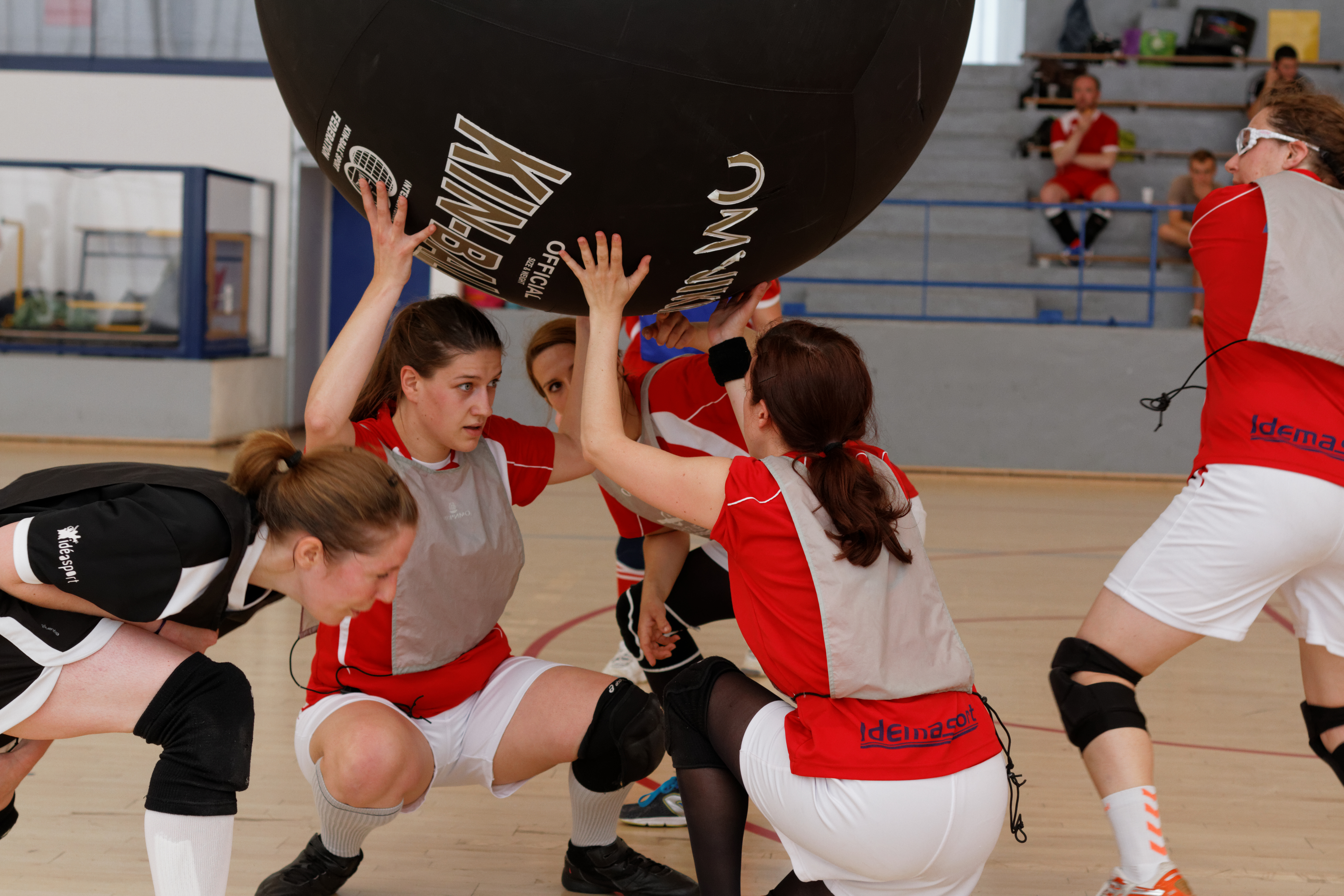 20e journée du championnat de France 2013-2014 de Kin-Ball, 8 juin 2014, Gymnase George Carpentier, Paris.